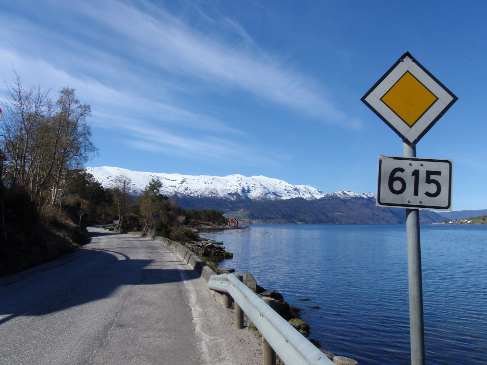 County road 615 in Sandane, Sogn og Fjordane, Norway